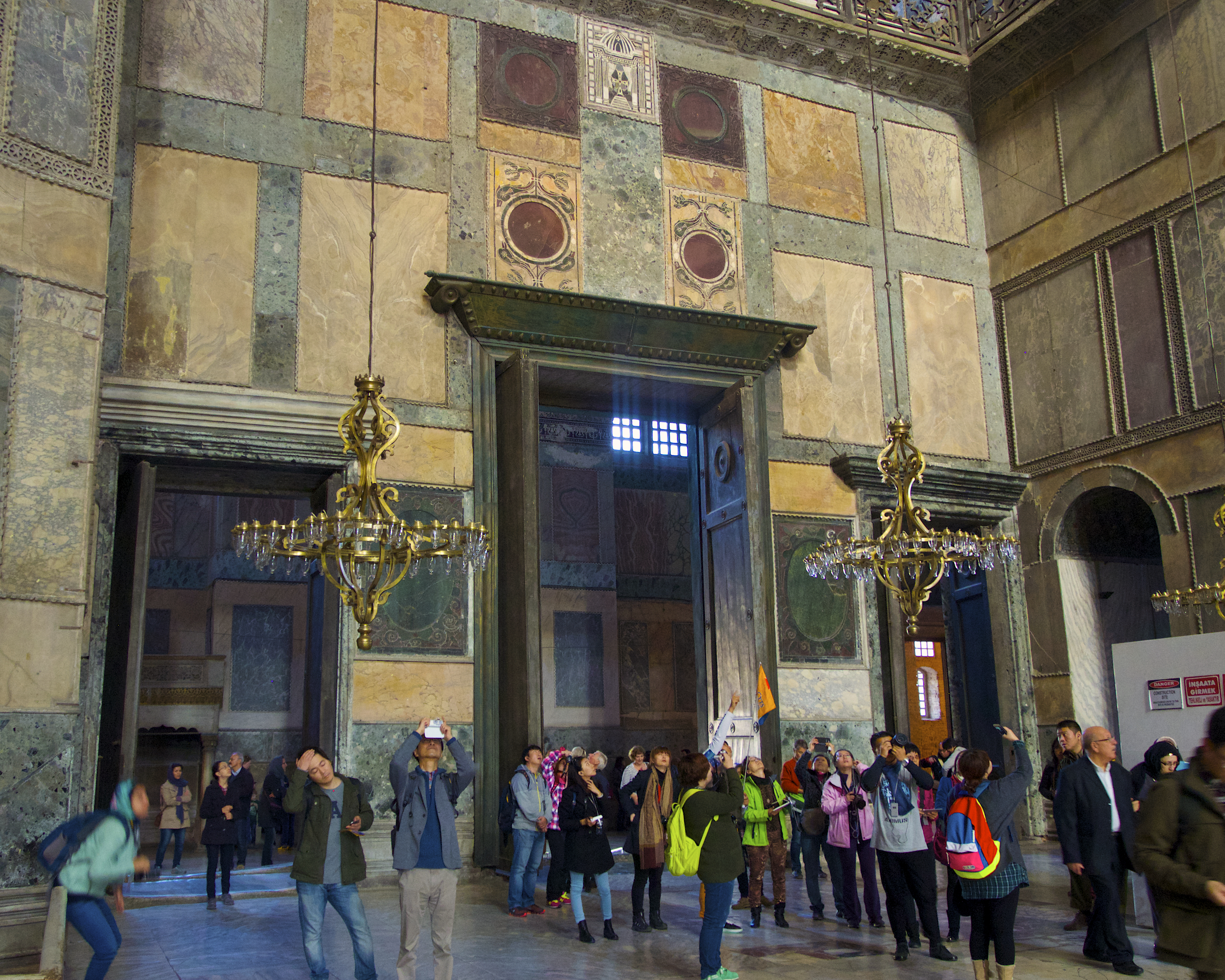 Hagia Sophia Istanbul, Turkey